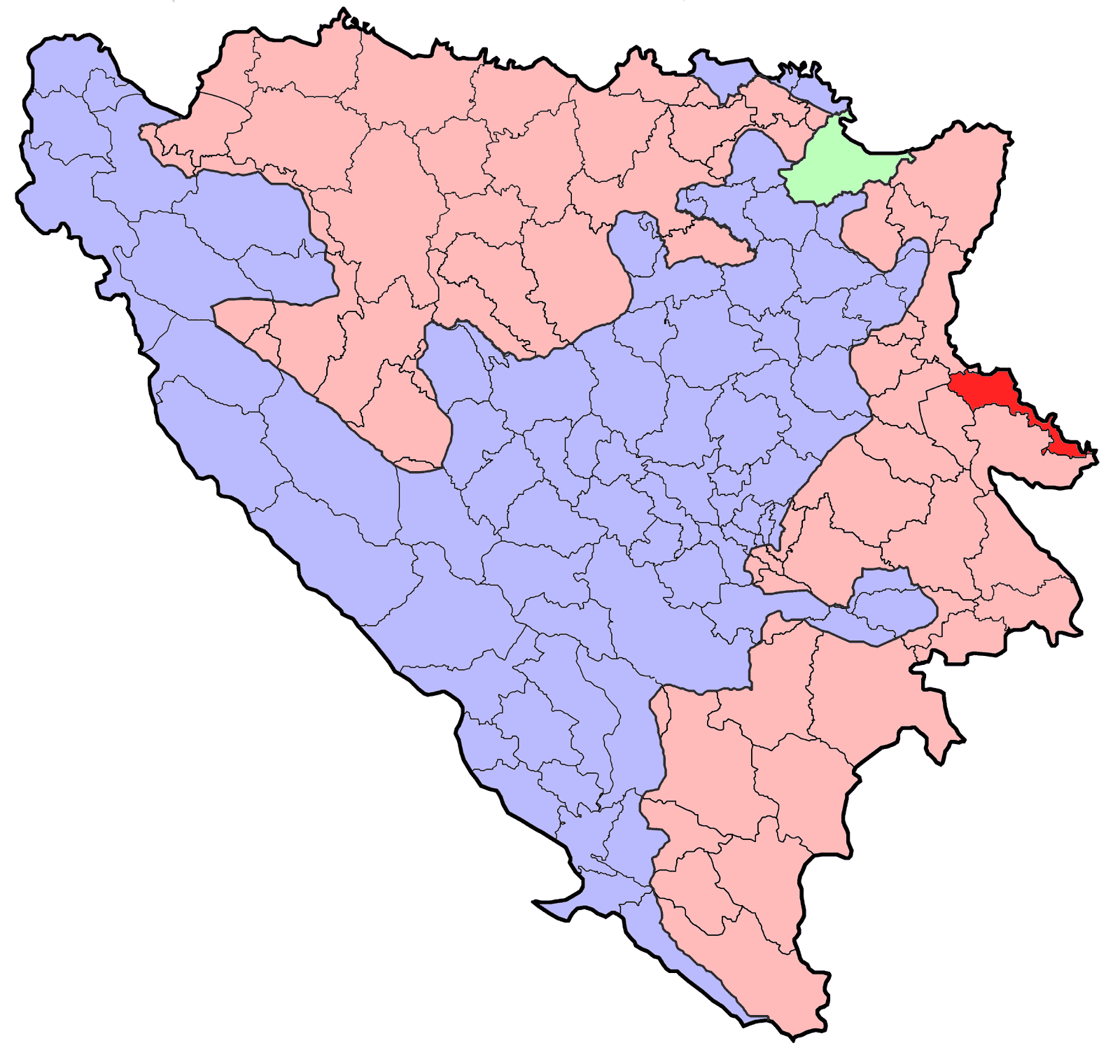 Republika Srpska (BiH) municipality